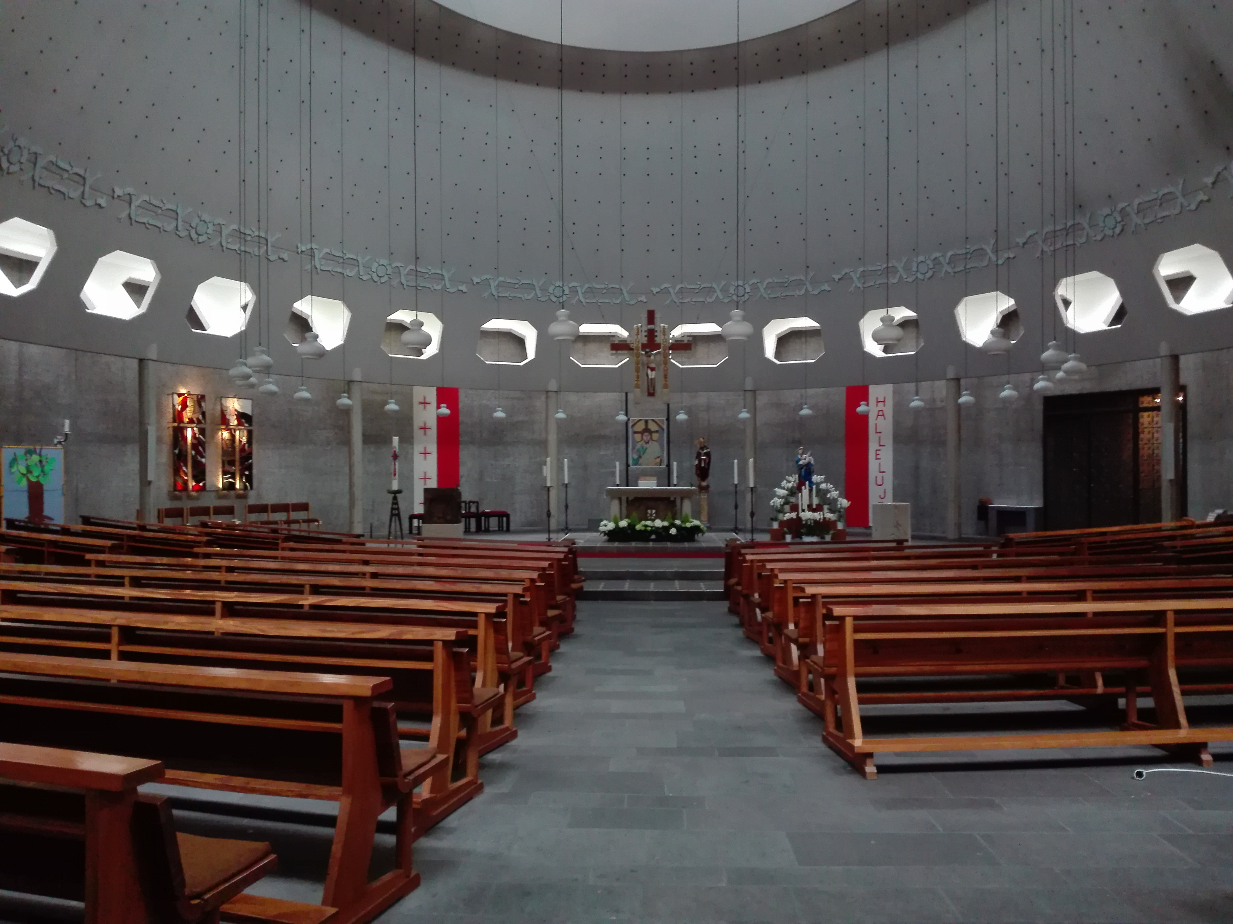 Innenansichten der katholischen Kirche Sankt Remigius in Wuppertal-Sonnborn